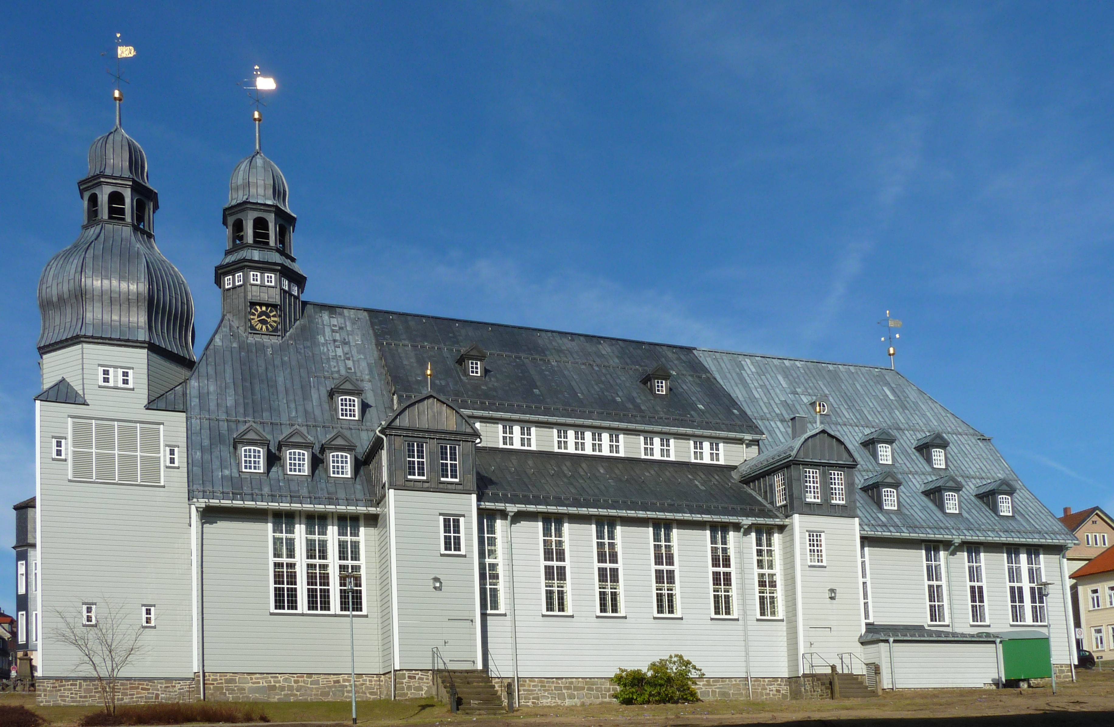 Marktkirche zum Heiligen Geist in Clausthal-Zellerfeld, Niedersachsen